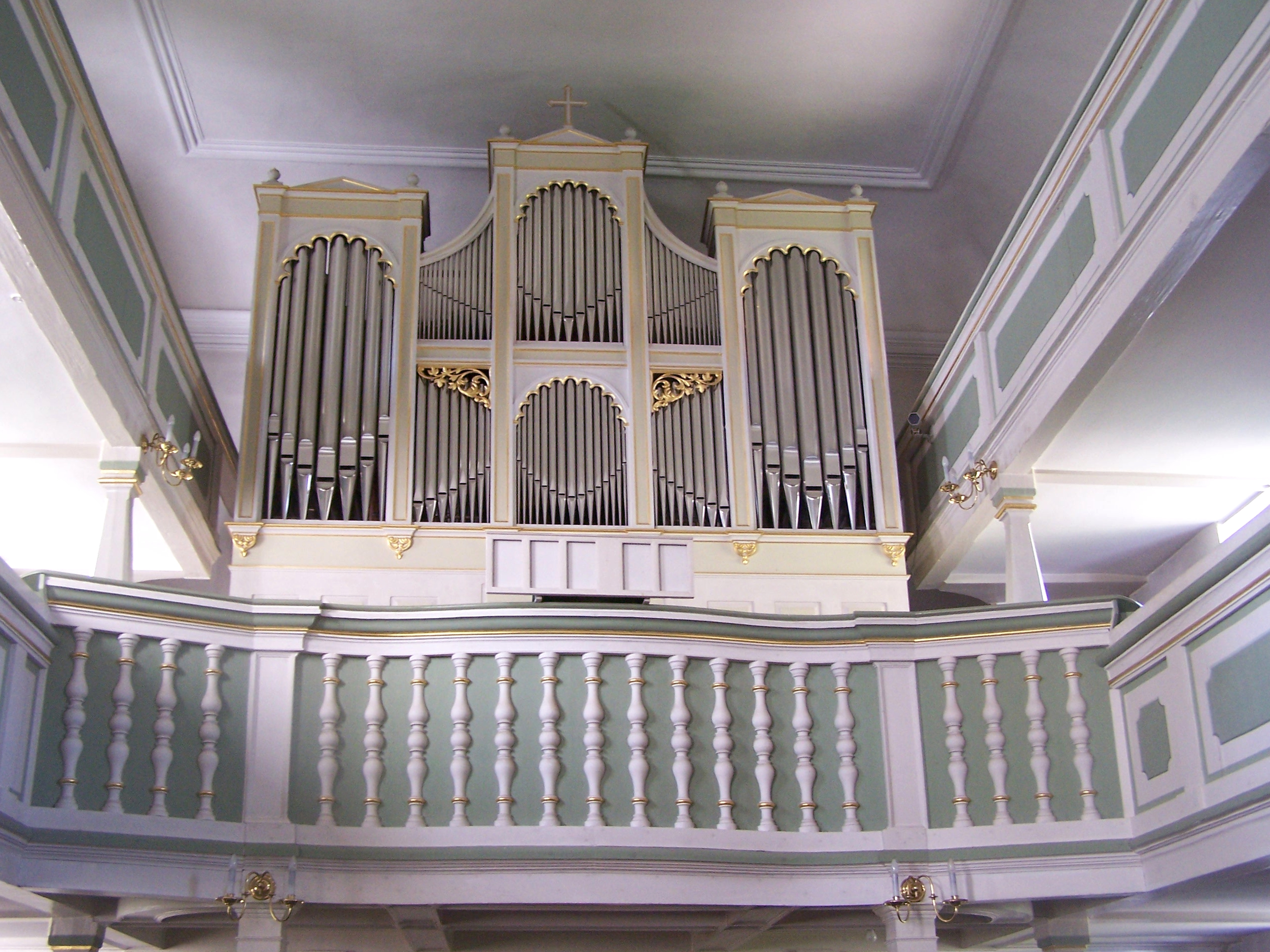 Orgel in der Kirche Maria am Wasser, Dresden-Hosterwitz